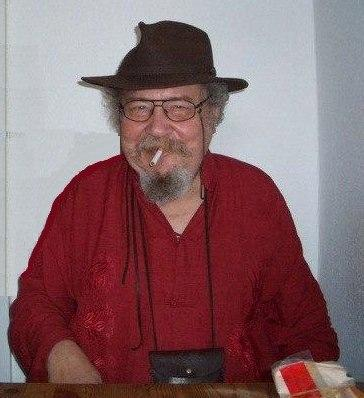 Das Bild zeigt den deutschen Maler und Komponisten Dietrich Boekle um das Jahr 2010. Dietrich Boekle war selten ohne seinen Hut und seinen Brustbeutel anzutreffen.